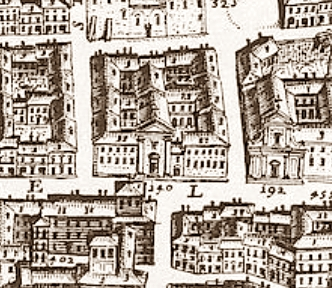 Pianta di Falda